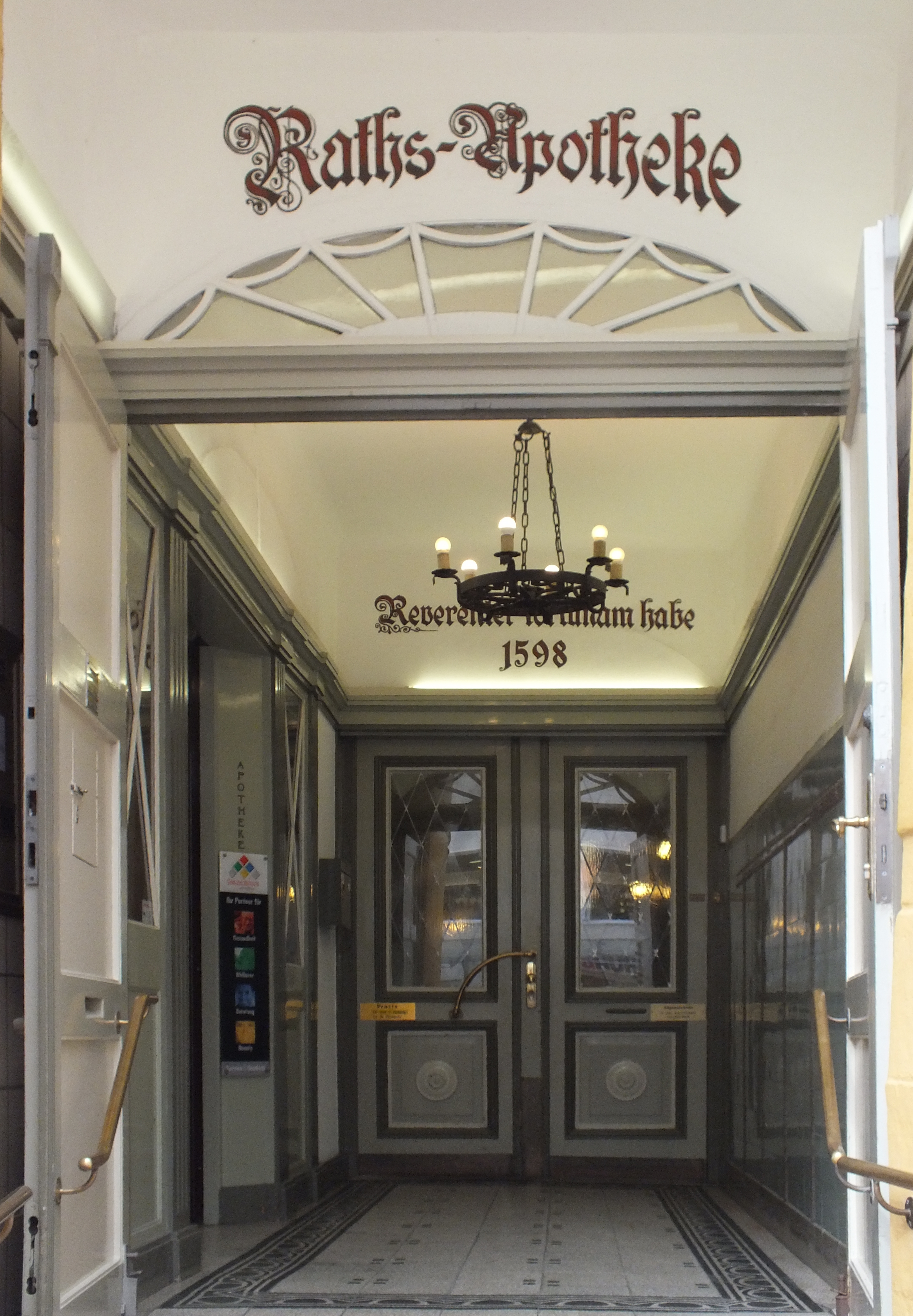 Lüneburg, Alte Raths-Apotheke